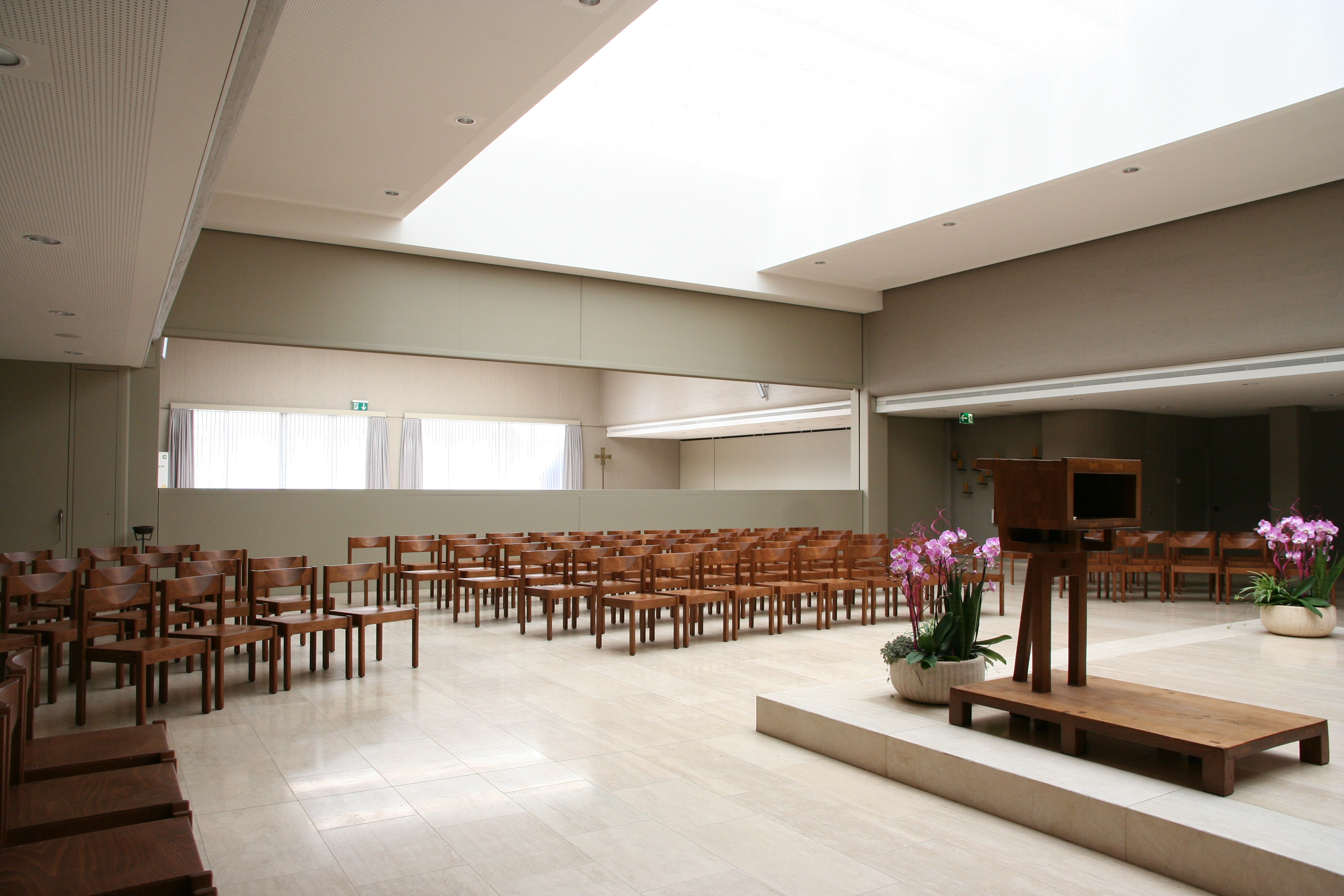 Römisch-katholische Pfarrkirche St. Johannes der Täufer Geroldswil, Innenansicht